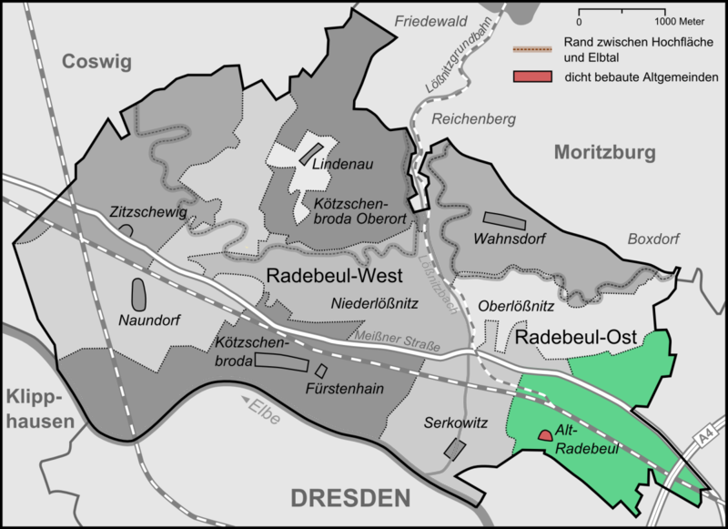 Karte der Stadtteile und Umlandgemeinden Radebeuls, hier Stadtteil Alt-Radebeul